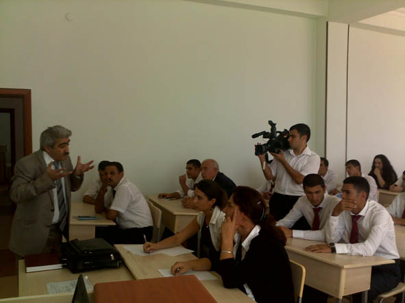 Adil Əsədov. Gənclərlə görüş